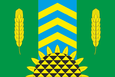 Прапор Великомихайлівського району